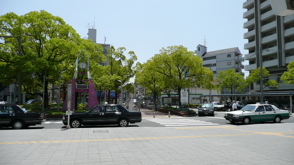 JR Kobe Line (Sanyo Main Line),Takatori Station plaza. /JR神戸線（山陽本線）鷹取駅・駅前広場